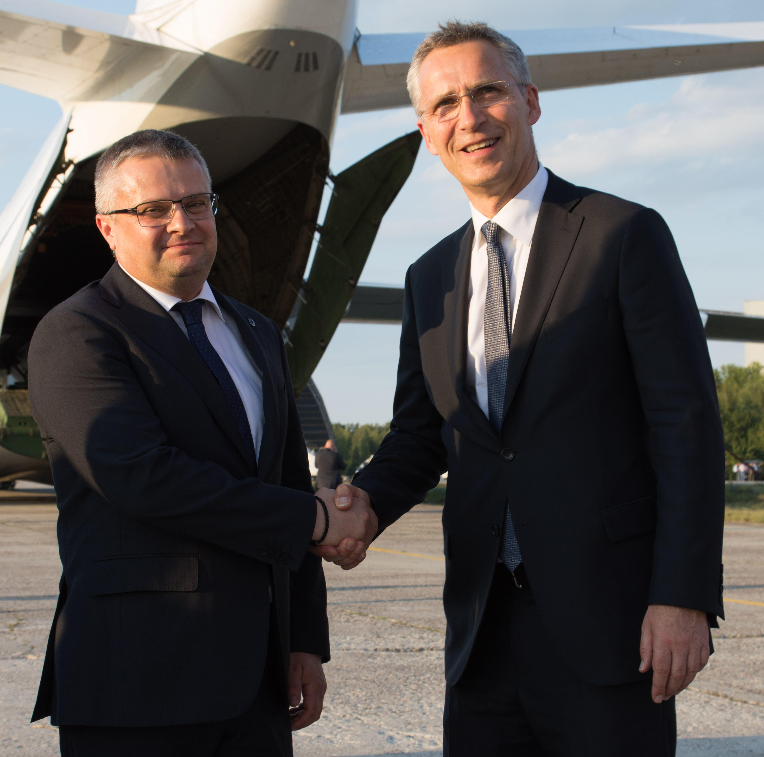 Зустріч Генерального секретаря НАТО Єнса Столтенберга із очільником "Укроборонпрмому" Романом Романовим